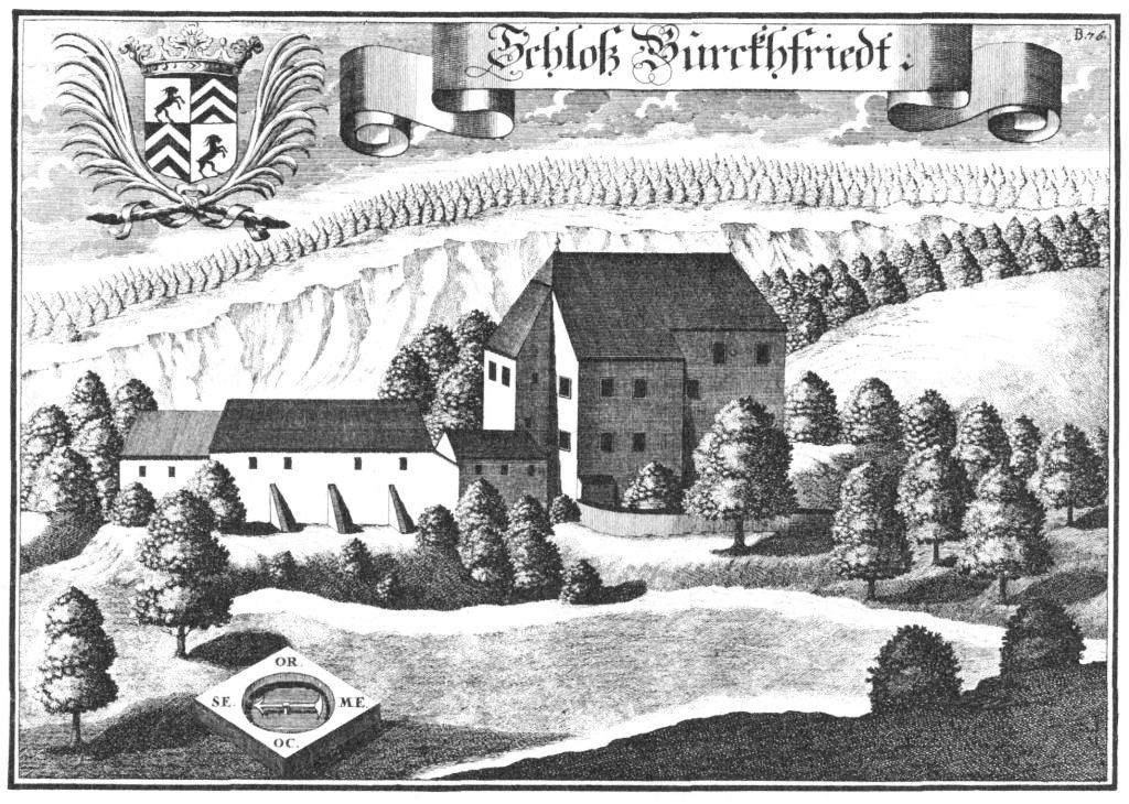 Schloss Burgfried nach einem Stich von Michael Wening (1721)